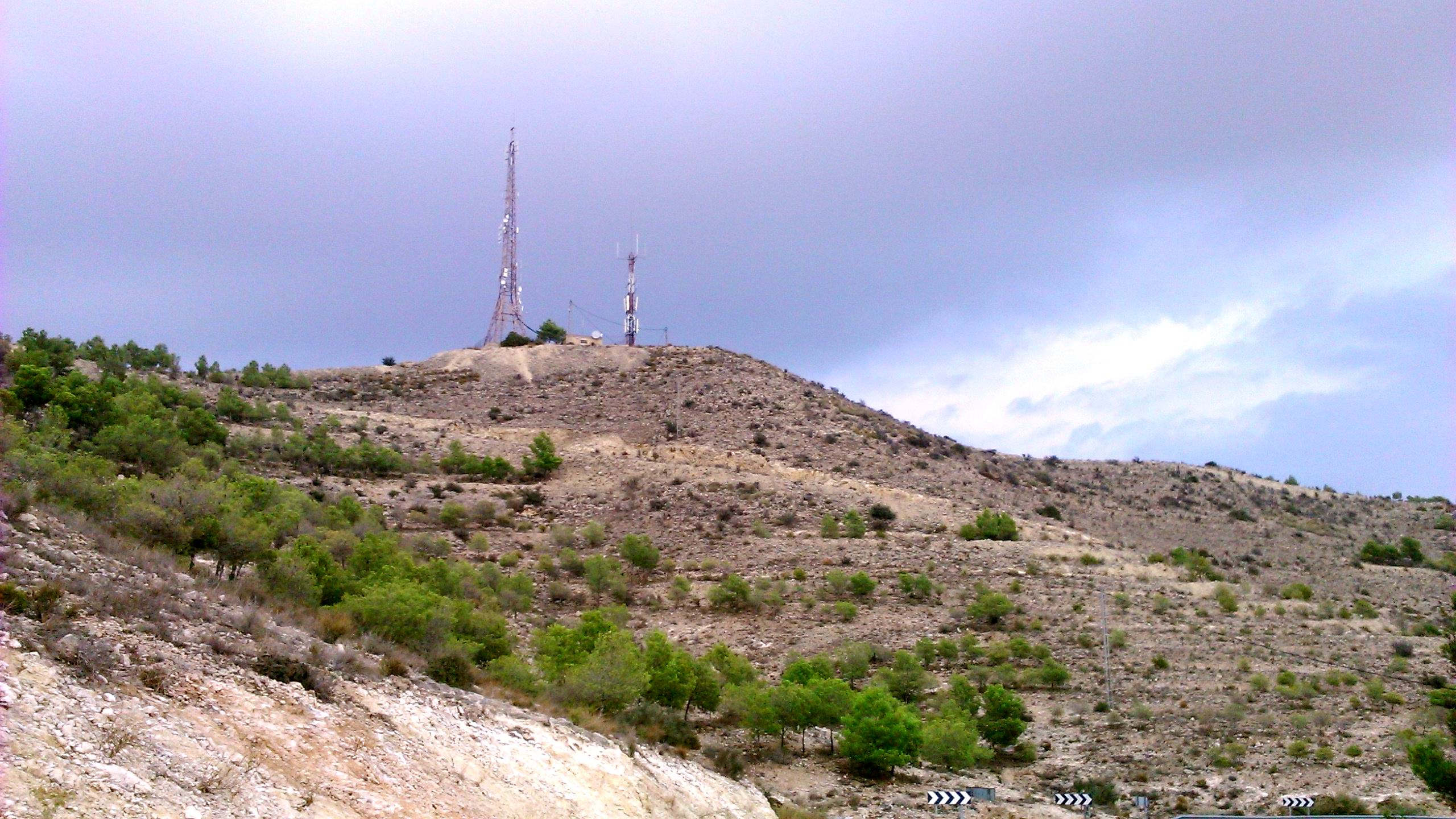 Sierra de la Torreta, Elda